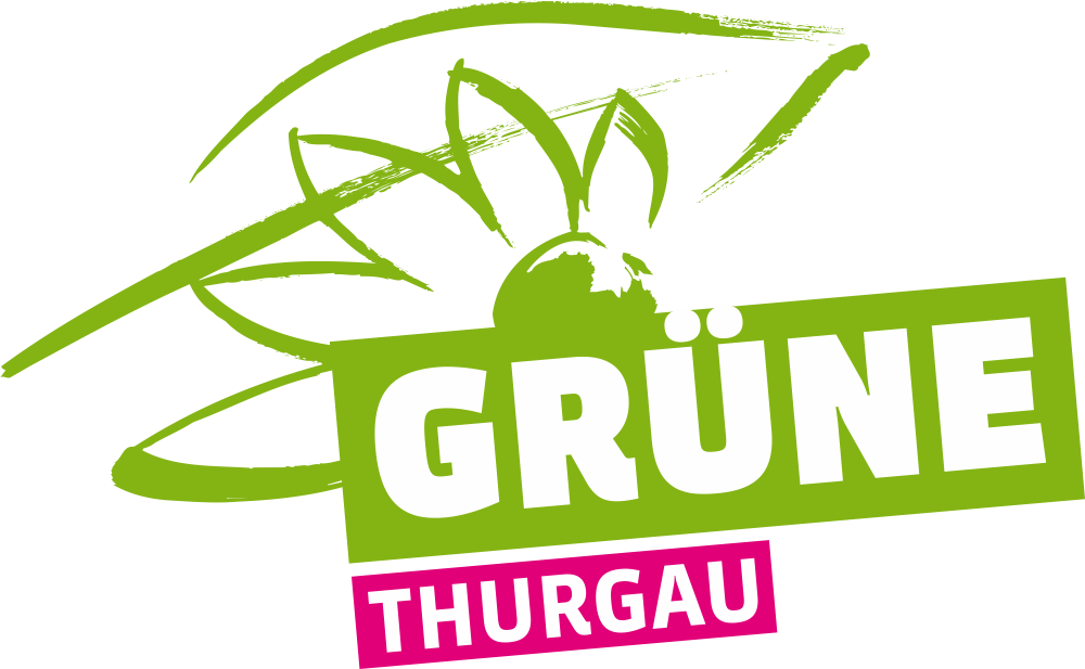 Logeo der Grünen Thurgau